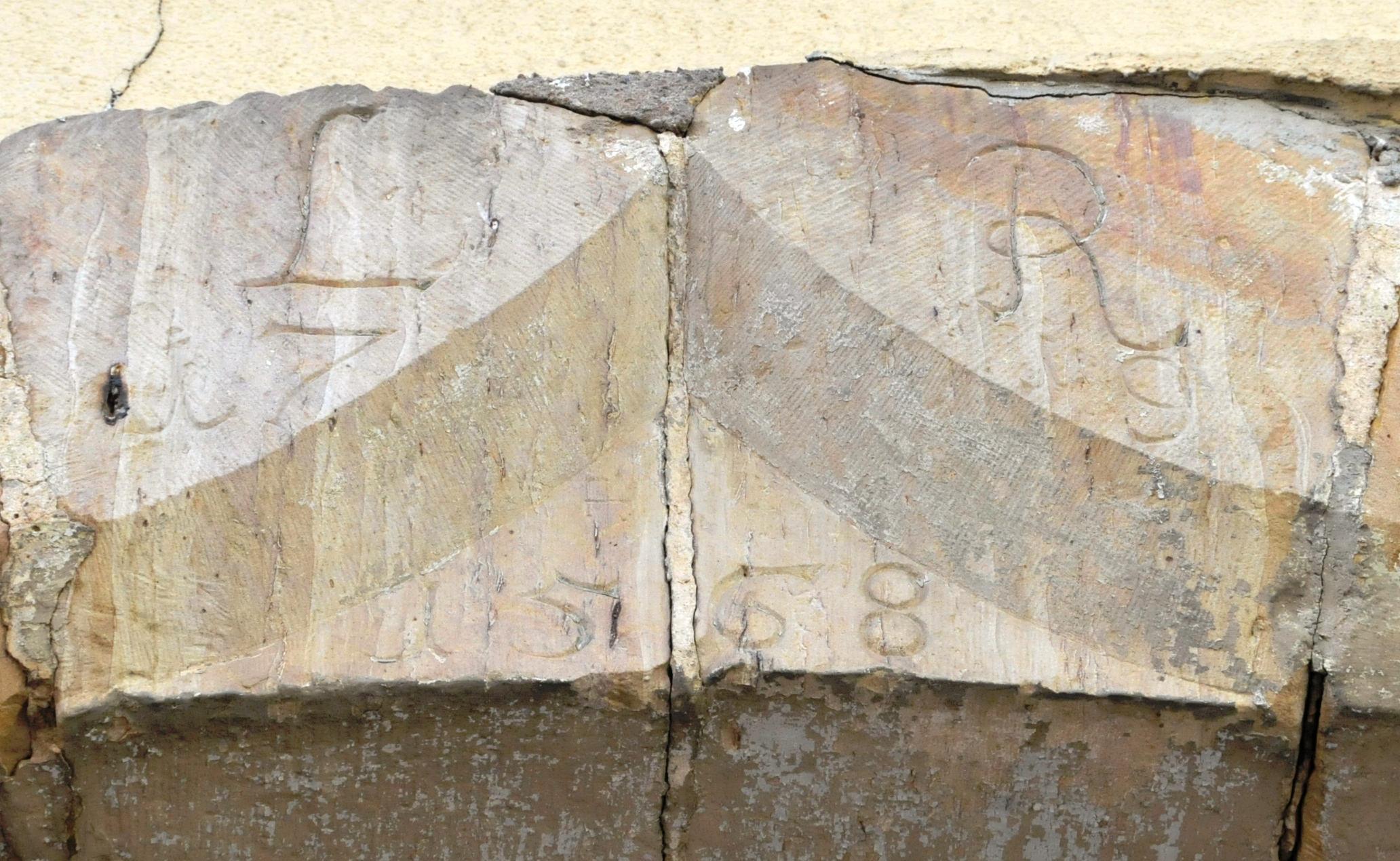 Pferdingsleben, Kirchstraße 67, Türsturz mit Jahreszahl 1558 und einer anderen schwer zu deutenden Zahl